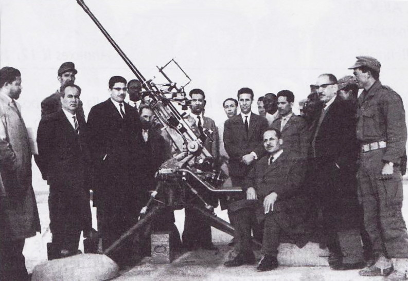 Hadj Lakhdar assis - cheikh Kheirredine debout - BenBella - Boudiaf - Ait Ahmed - Nelson Mandela est a gauche Frontière ouest mars 1962